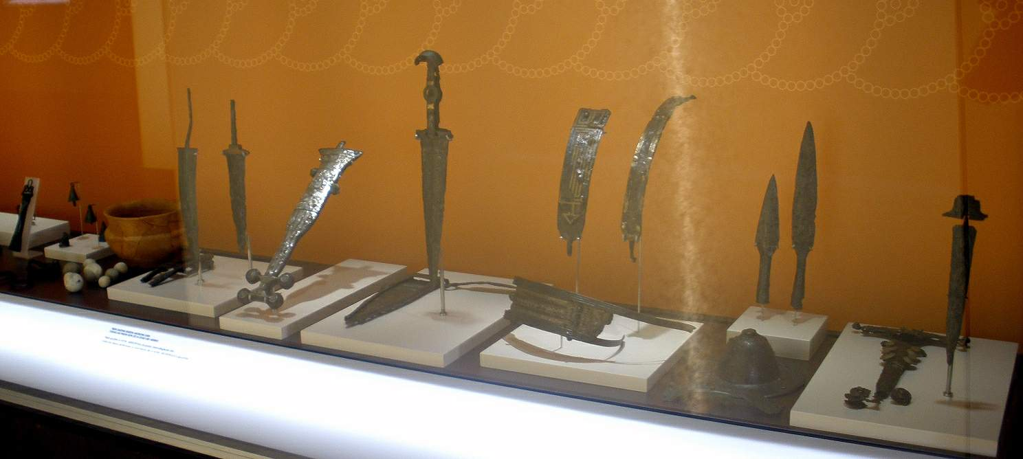 Armas de la Edad del Hierro, procedentes de la necropolis de La Hoya. Se exponen en el Bibat Museo de Arqueología de Álava (Vitoria-Gasteiz)